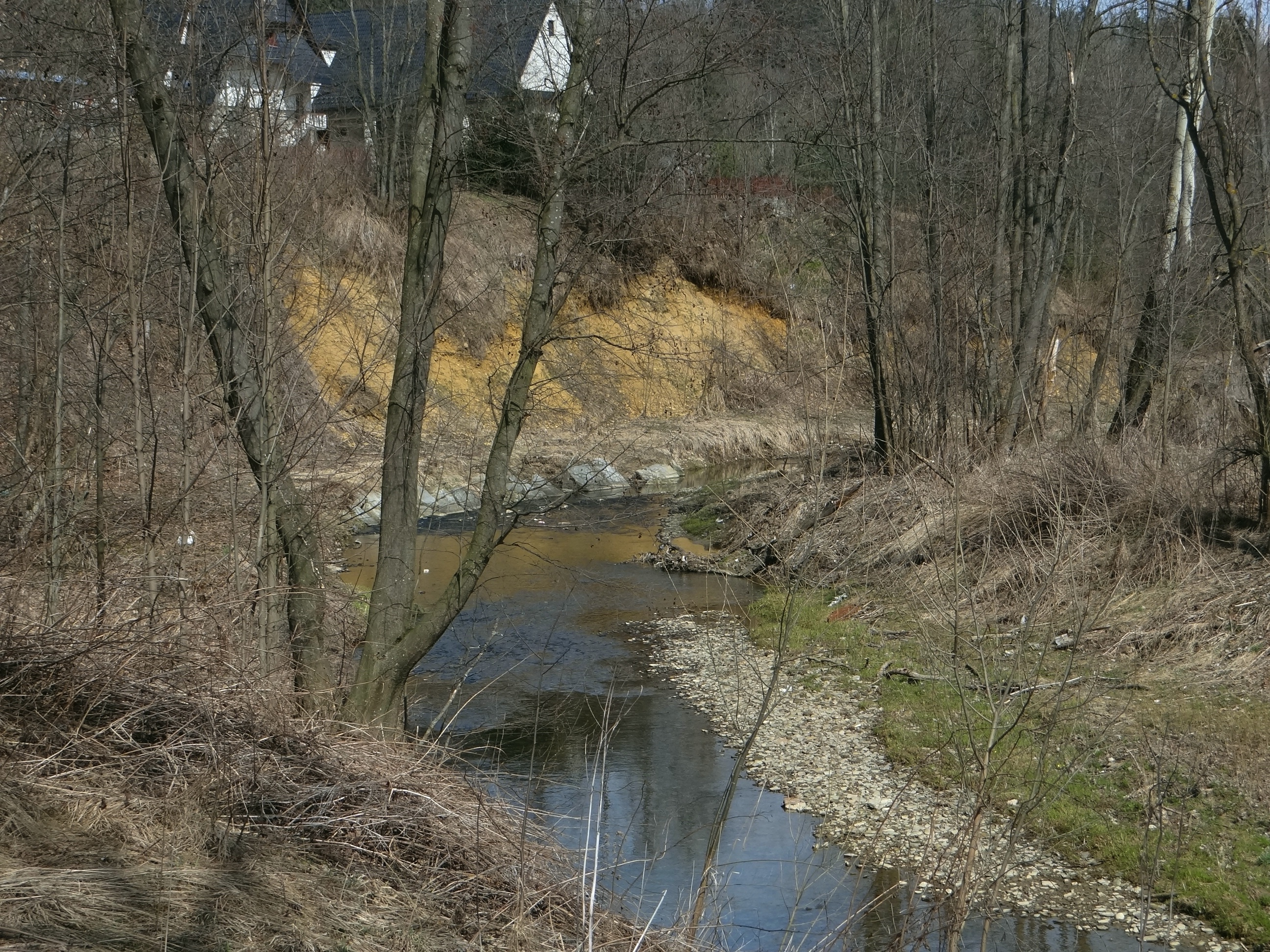 Potok Ciche